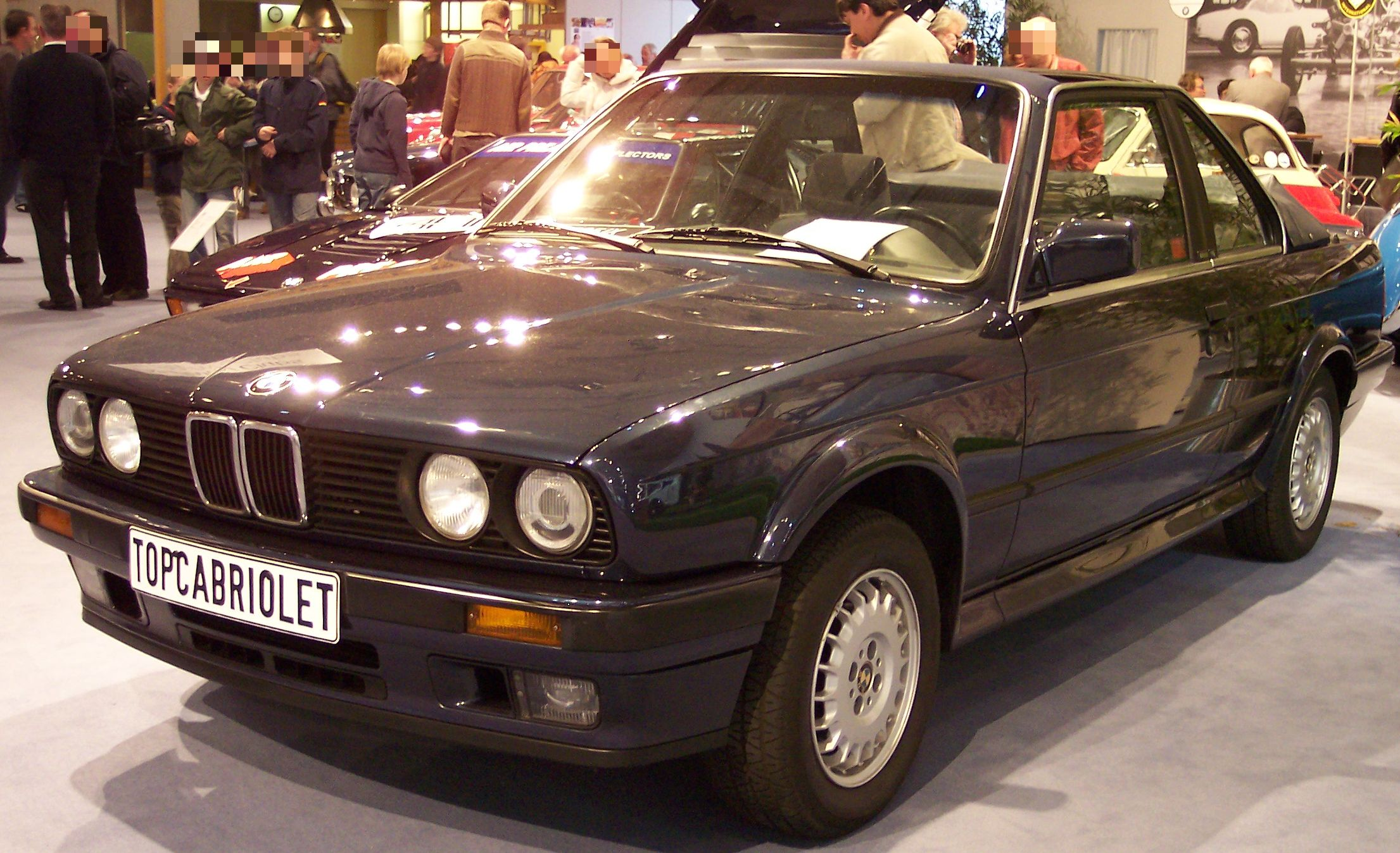 BMW E30 Baur Topcabriolet, im Bild 325iX mit seltenen TD-Rädern mit 200/60VR365 auf 365x150